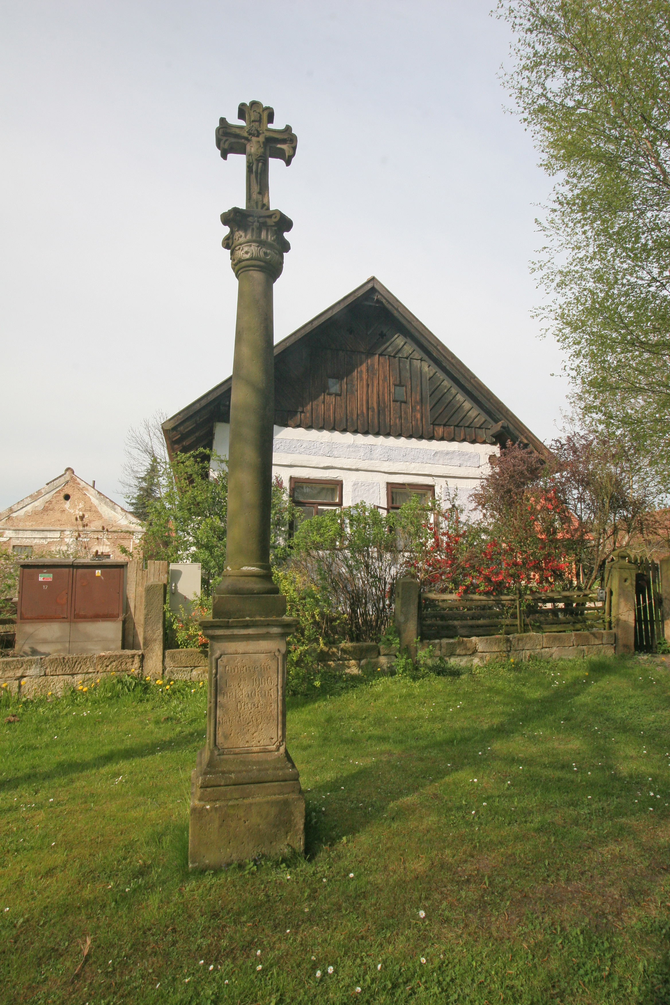 Hlušičky boží muka